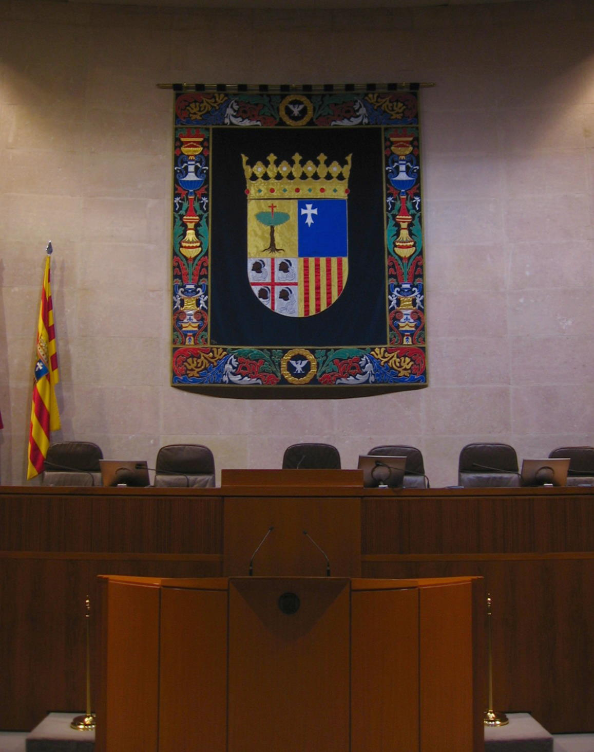 Aljafería de Zaragoza, Aragón: cámara de las Cortes de Aragón